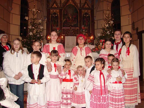 Nastup KUD-a Dučec na Božičnom koncertu u crkvi Sv. Vida u Mraclinu.